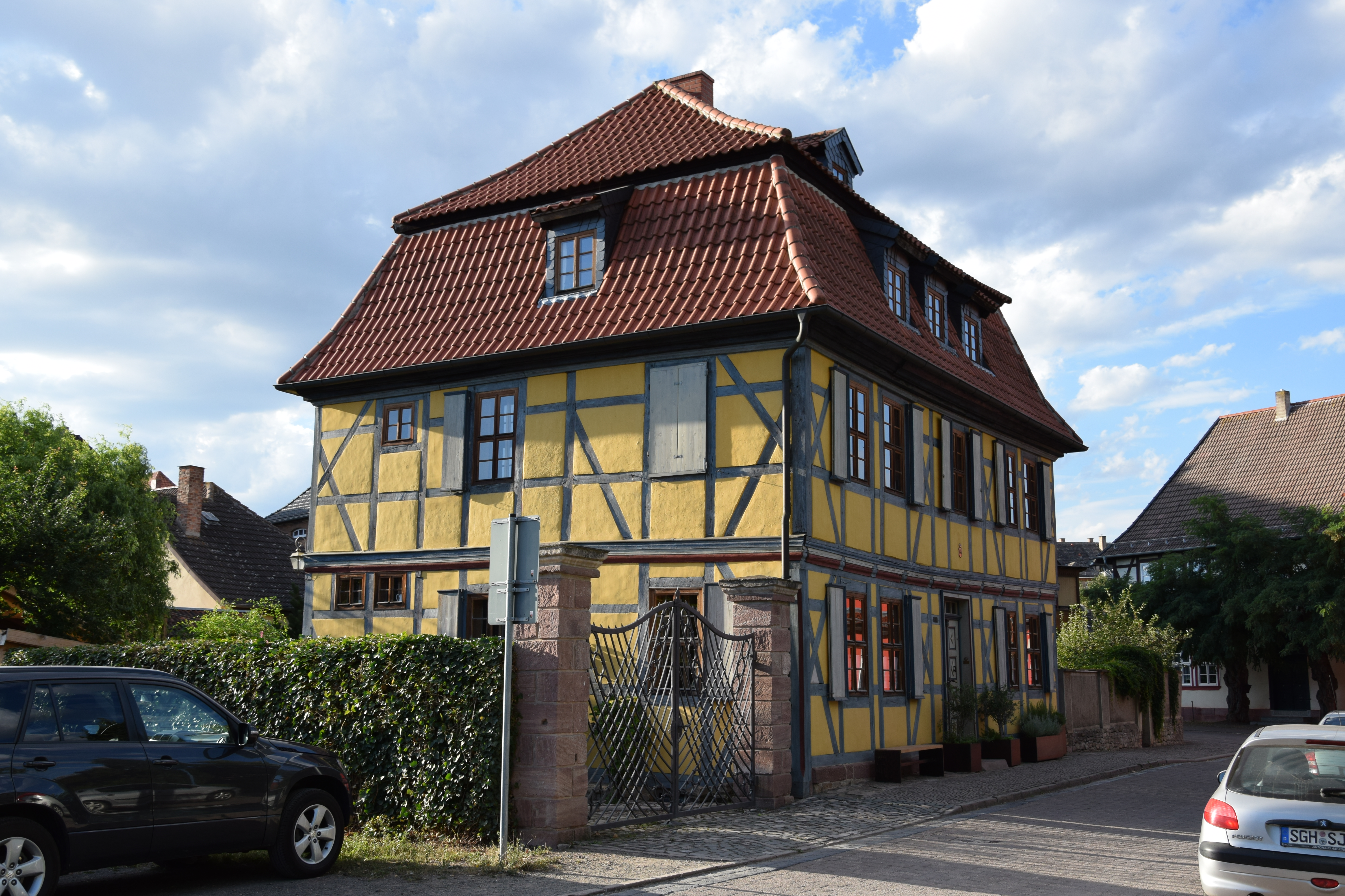 Roßla, Wilhelmstraße 49, ehemaliger MeierhofThis is a photograph of an architectural monument. 83089